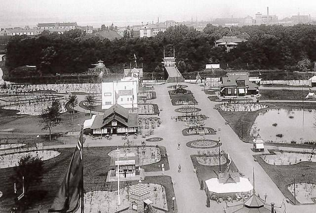 Bild från Malmöutställningen 1896 tagen från toppen av Industrihallen, mot Kungsparken. Bild av okänd från 1896. Bild ur boken ”Allt ljus på Malmö”